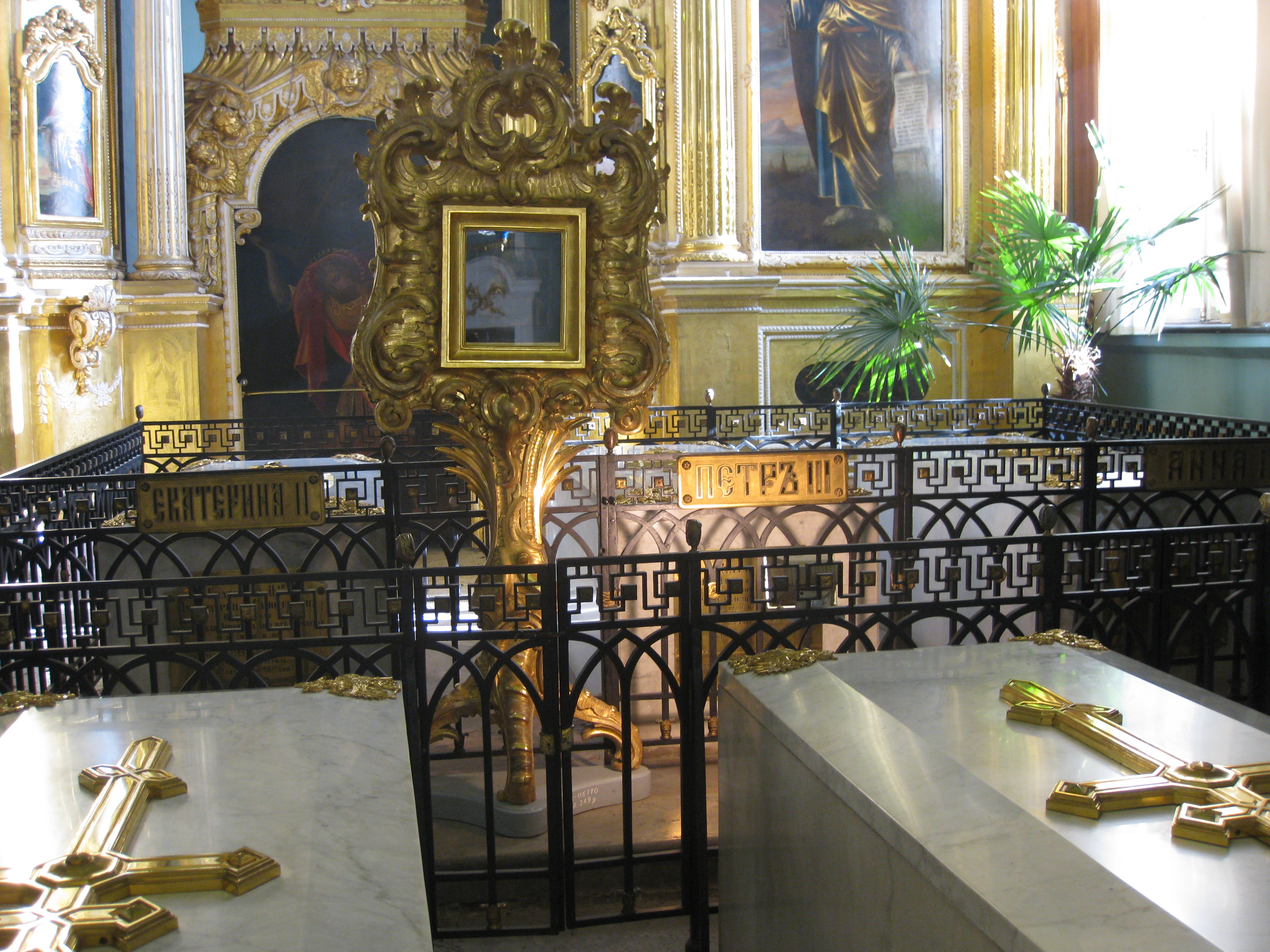 Saint Peter & Paul Cathedral קתדרלת פטרוס ופאולוס במצודת פטרוס ופאולוס סנקט פטרבורג בקתדרלה קבורים כל הצארים (למעט אחד) מאז פיוטר הגדול.